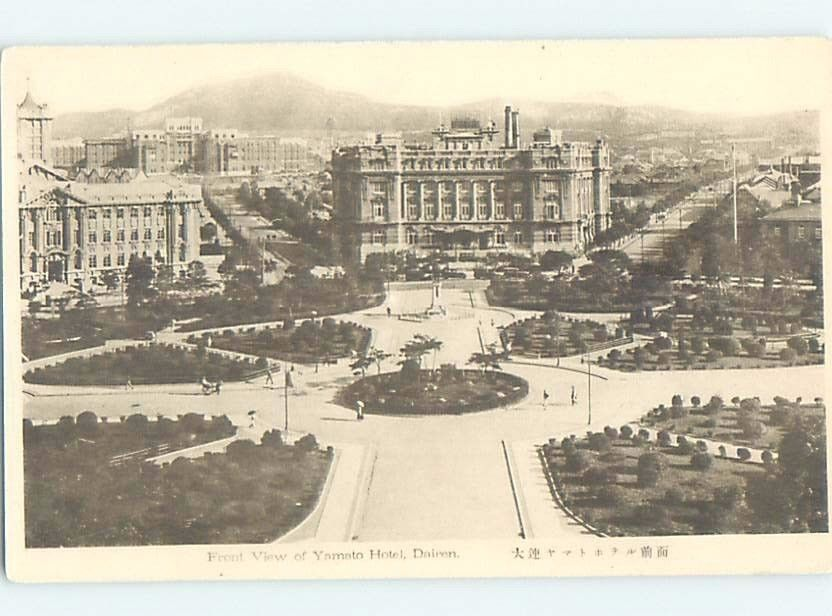 大连大和旅馆旧照